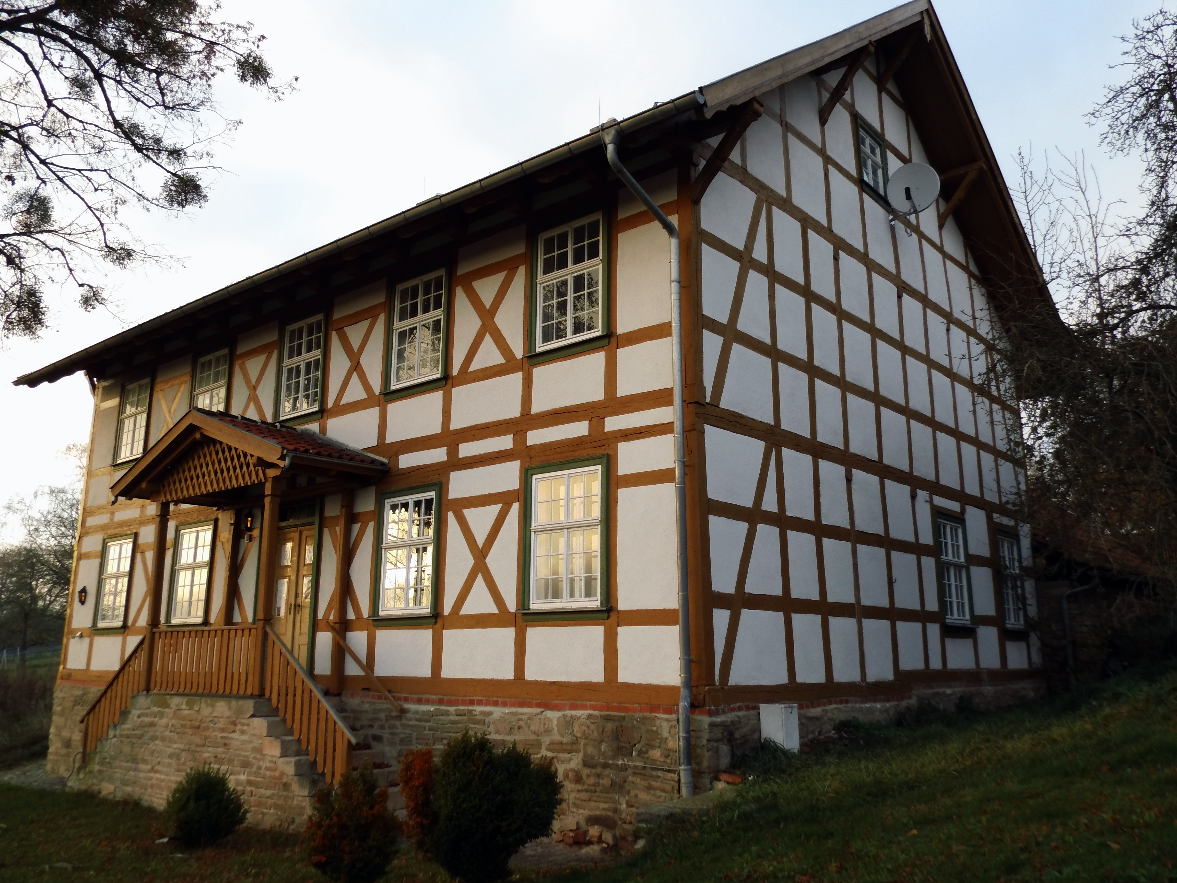 Einstiges Pfarrhaus in Limlingerode, Geburtshaus von Sarah Kirsch, heute Dichterstätte Sarah Kirsch. Foto: Holger Zürch